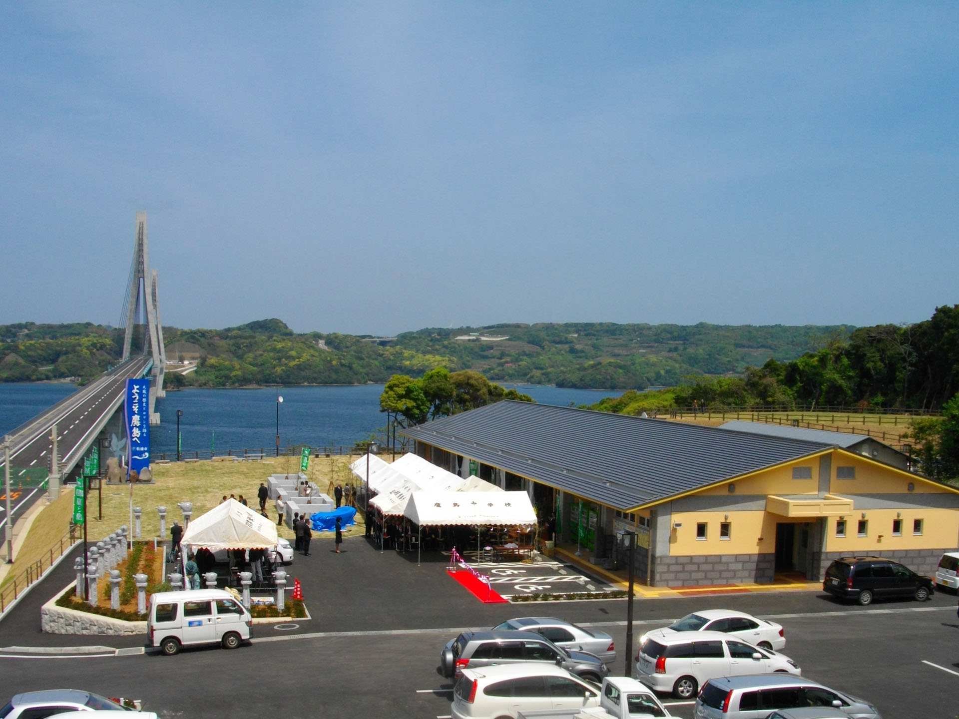 道の駅 鷹ら島（長崎県松浦市鷹島町）。開駅式当日に撮影。